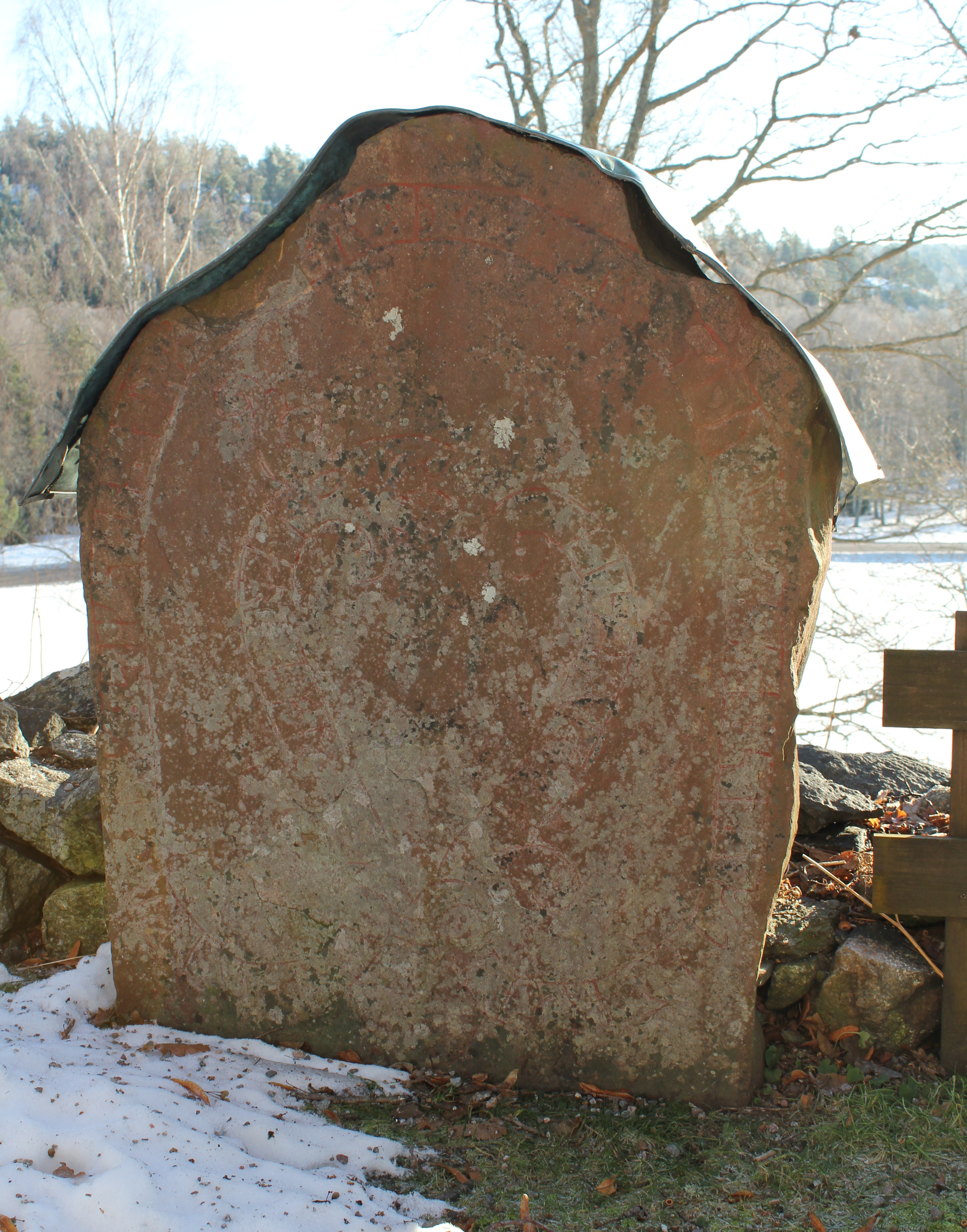 Runstenen Sö 291 vid Grödinge kyrka.